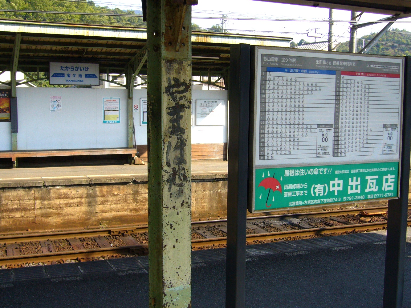 京都市左京区にある叡山電鉄叡山本線及び鞍馬線の宝ヶ池駅の2.3番ホームの上屋の柱に残る「やまはな」の旧駅名。向こう側のホームに見えるような柱に取り付ける広告板を取り外した跡に残る。後に書かれた新駅名「宝ヶ池」と字が重なっている。2008年10月19日に投稿者が撮影。